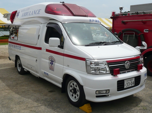 水戸市消防本部の救急車